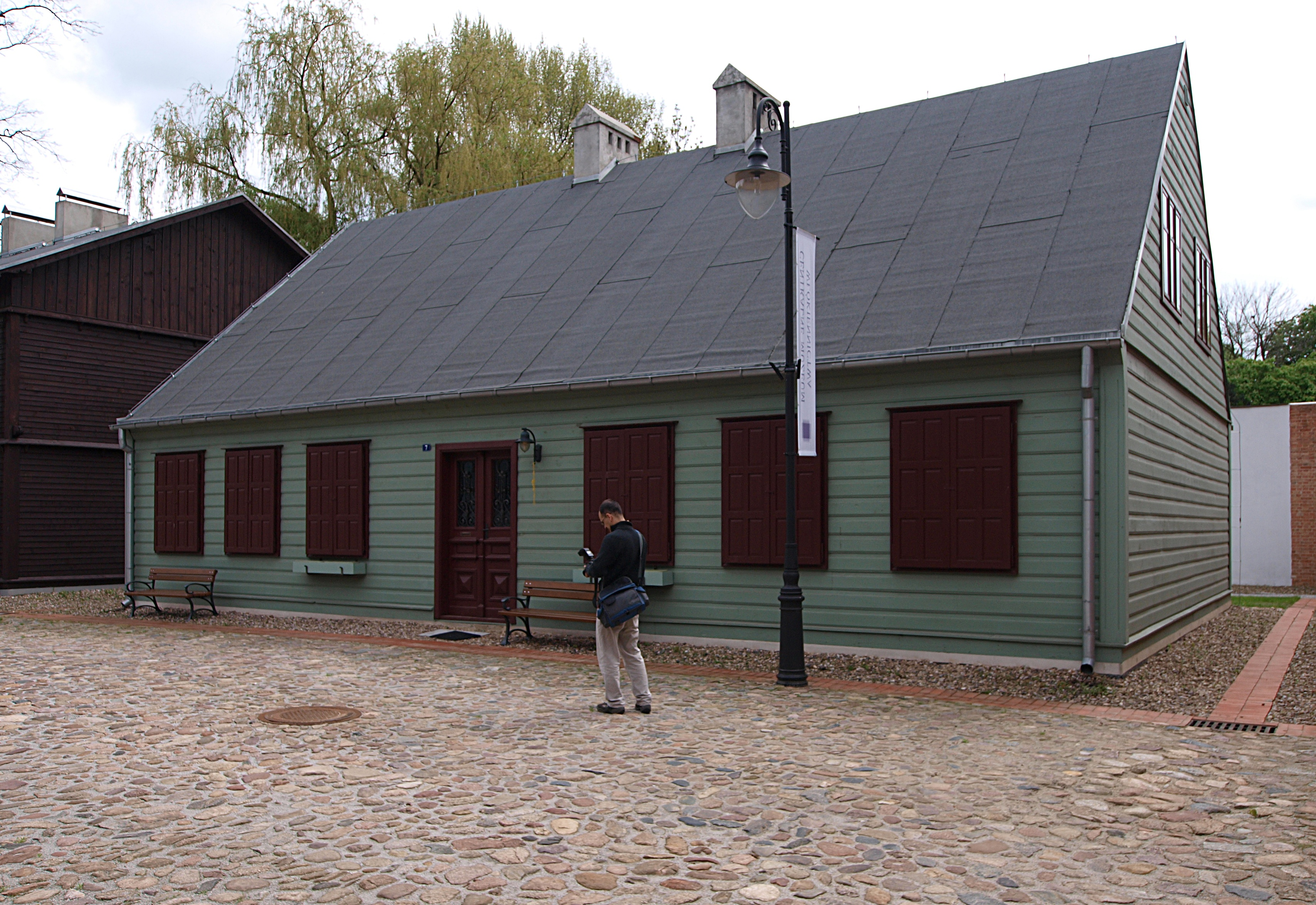 Skansen Łódzkiej Architektury Drewnianej. Budynek pierwotnie znajdujący się na ul. Żeromskiego 68.